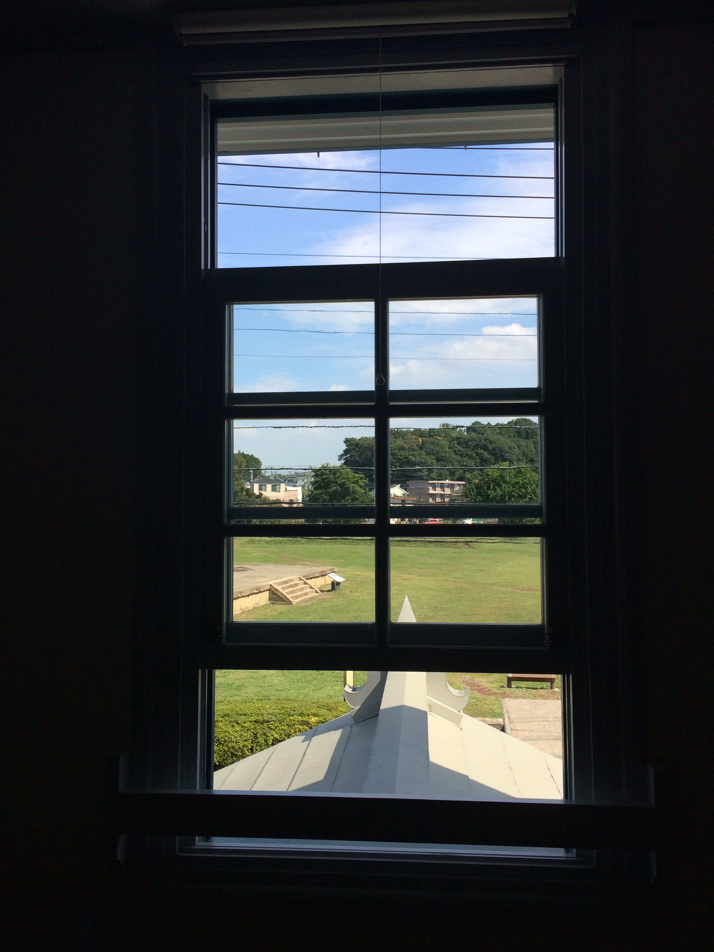 市立郷土資料館「海老名市温故館」の窓